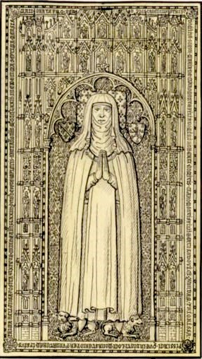 Tomb in Poissy